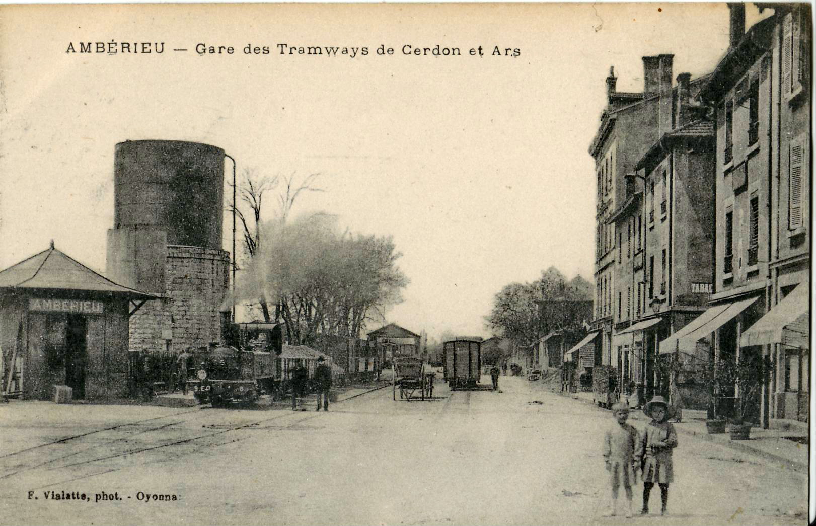 Carte postale ancienne éditée par E. Vialatte à Oyonnax : AMBERIEU - Gare des Tramways de Cerdon et d'Ars. Tramways de l'Ain - Locomotive n° 6 ou n°8 de l'ESE, construite par Corpet-Louvet